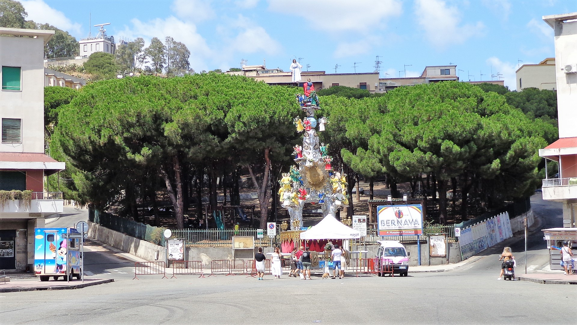 Piazza Castronovo, stazione di partenza.